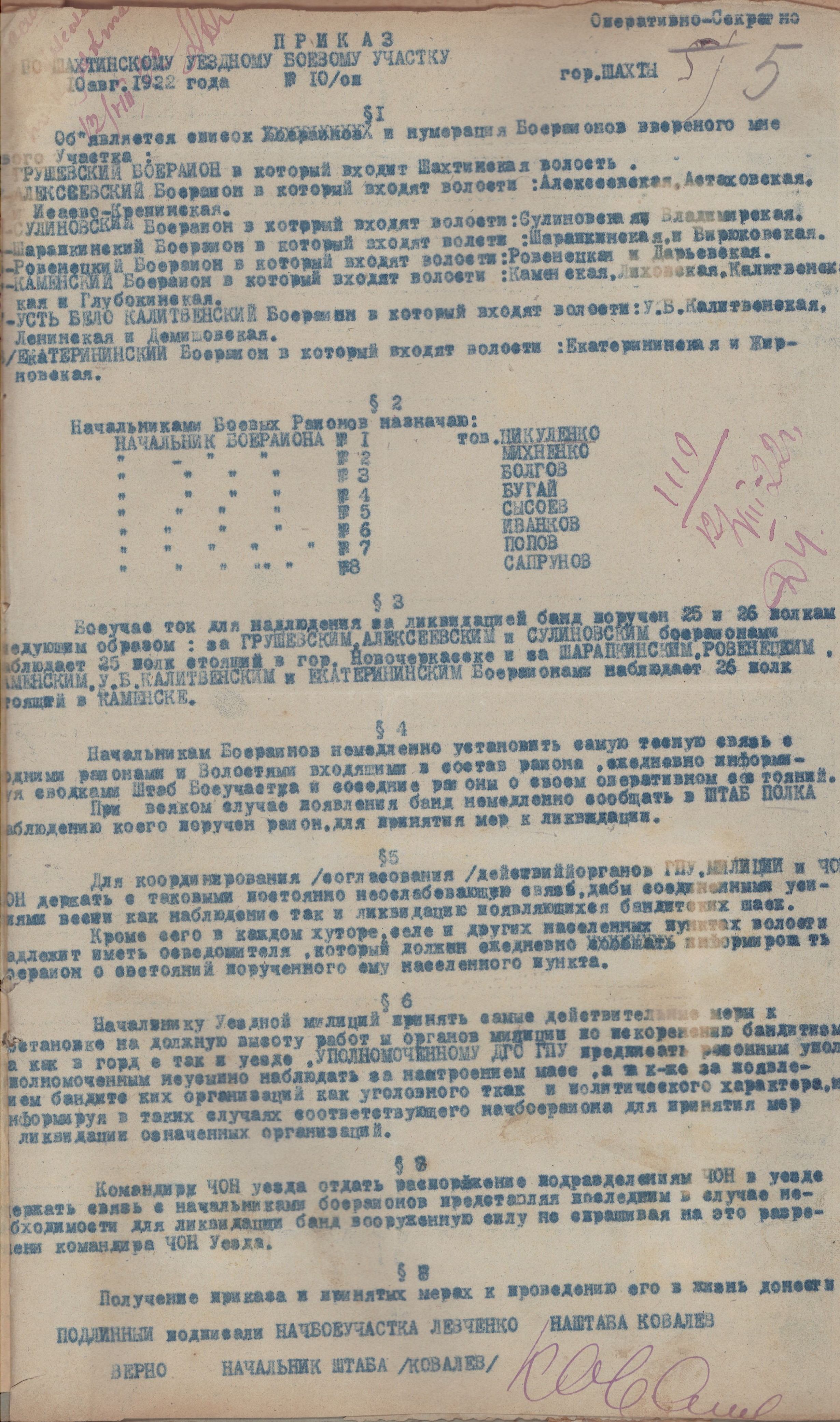 Приказ по Шахтинскому уездному боевому участку от 10 августа 1922 года.